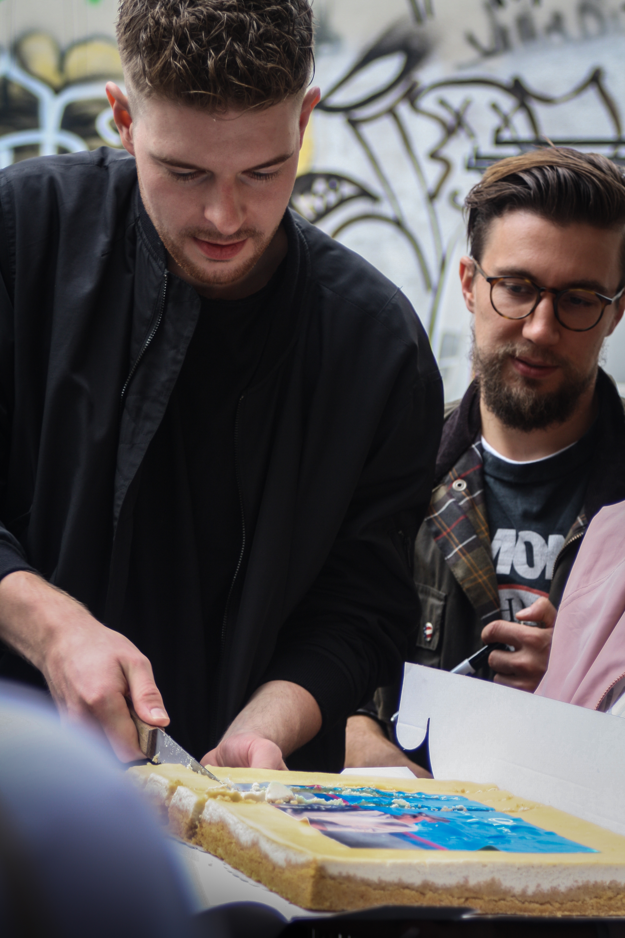 Olson (links) mit Prinz Pi (rechts) beim Release von Ballonherz (2014)